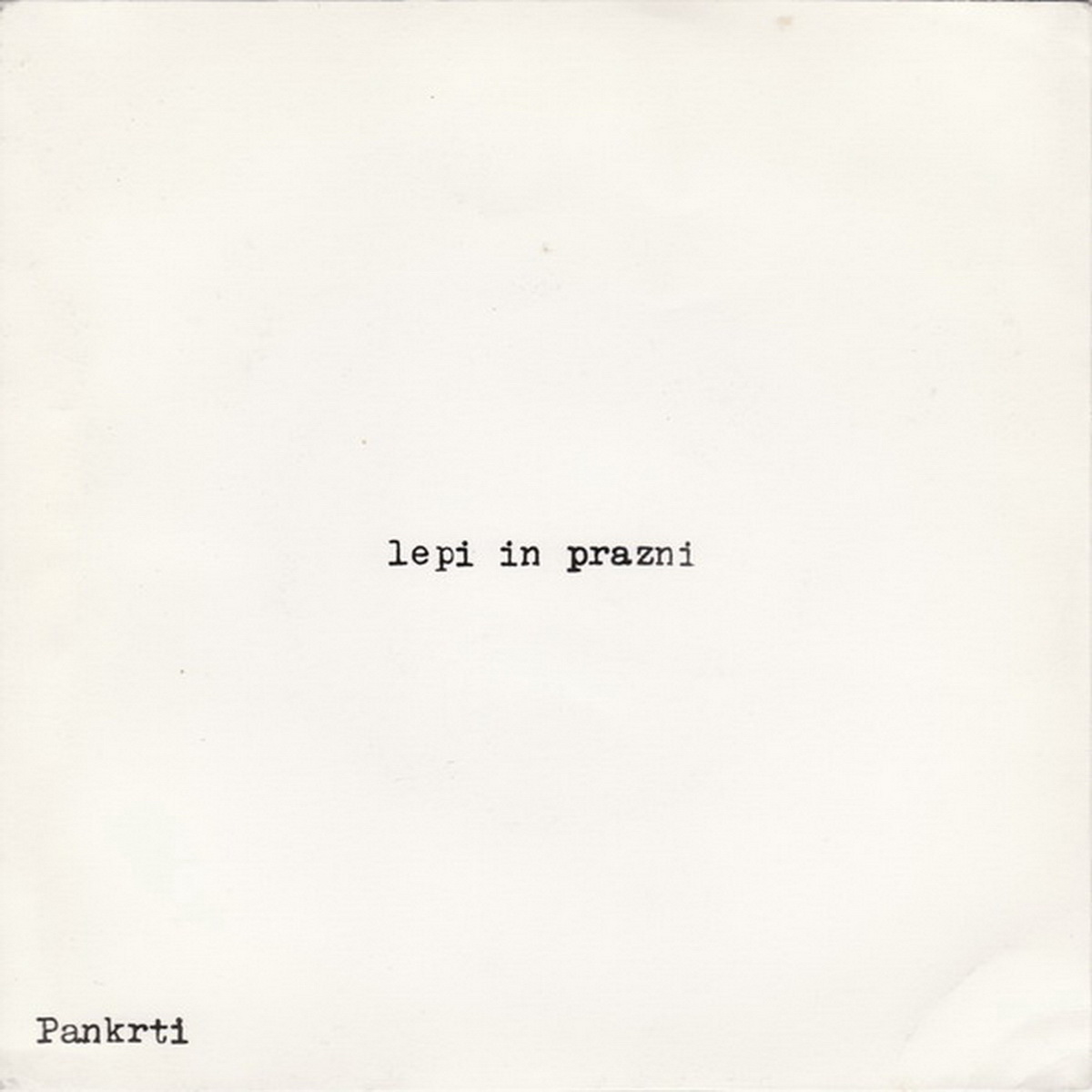 Album Lepi in prazni skupine Pankrti.